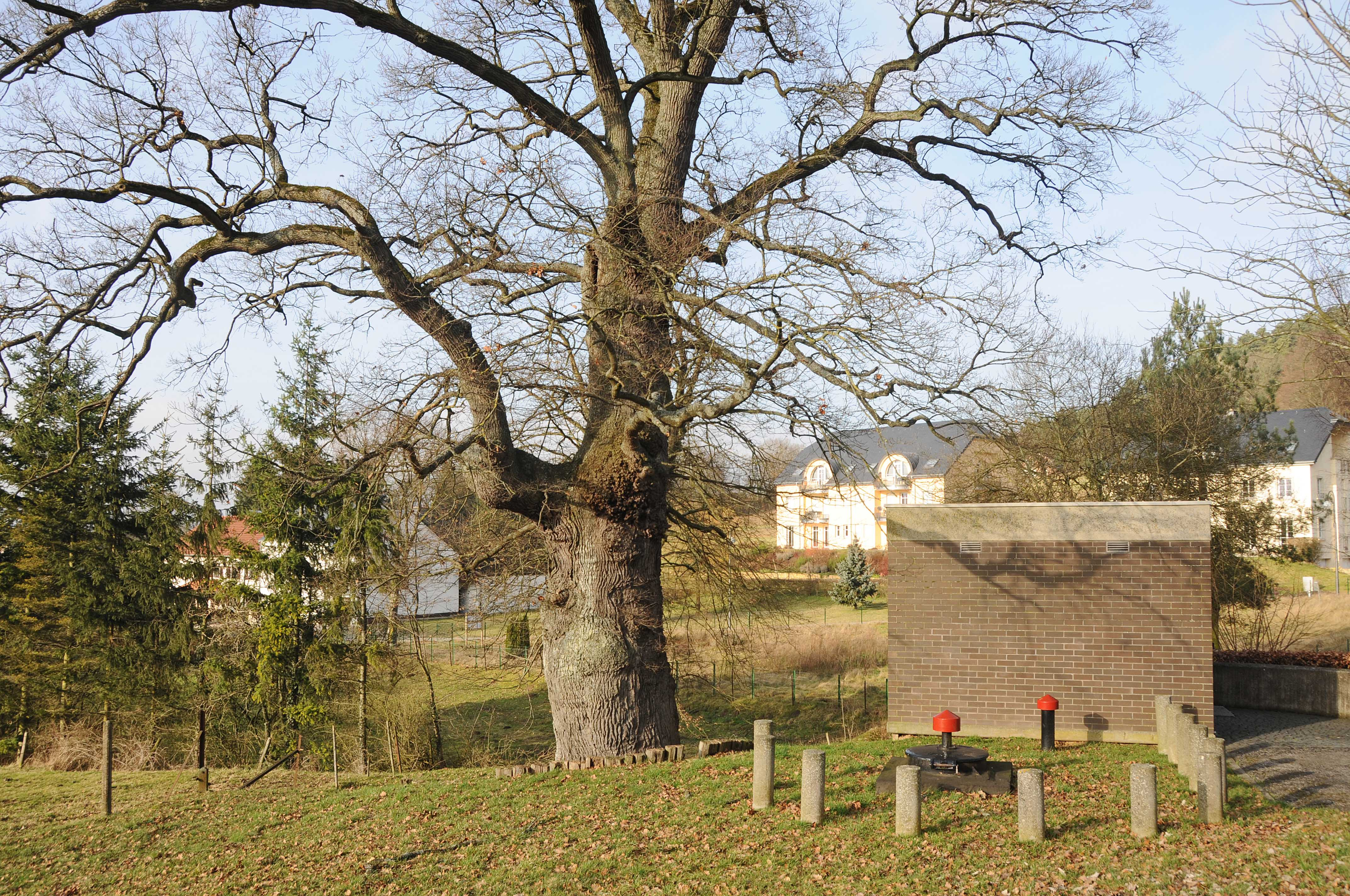 Eech zu Kaalmes.